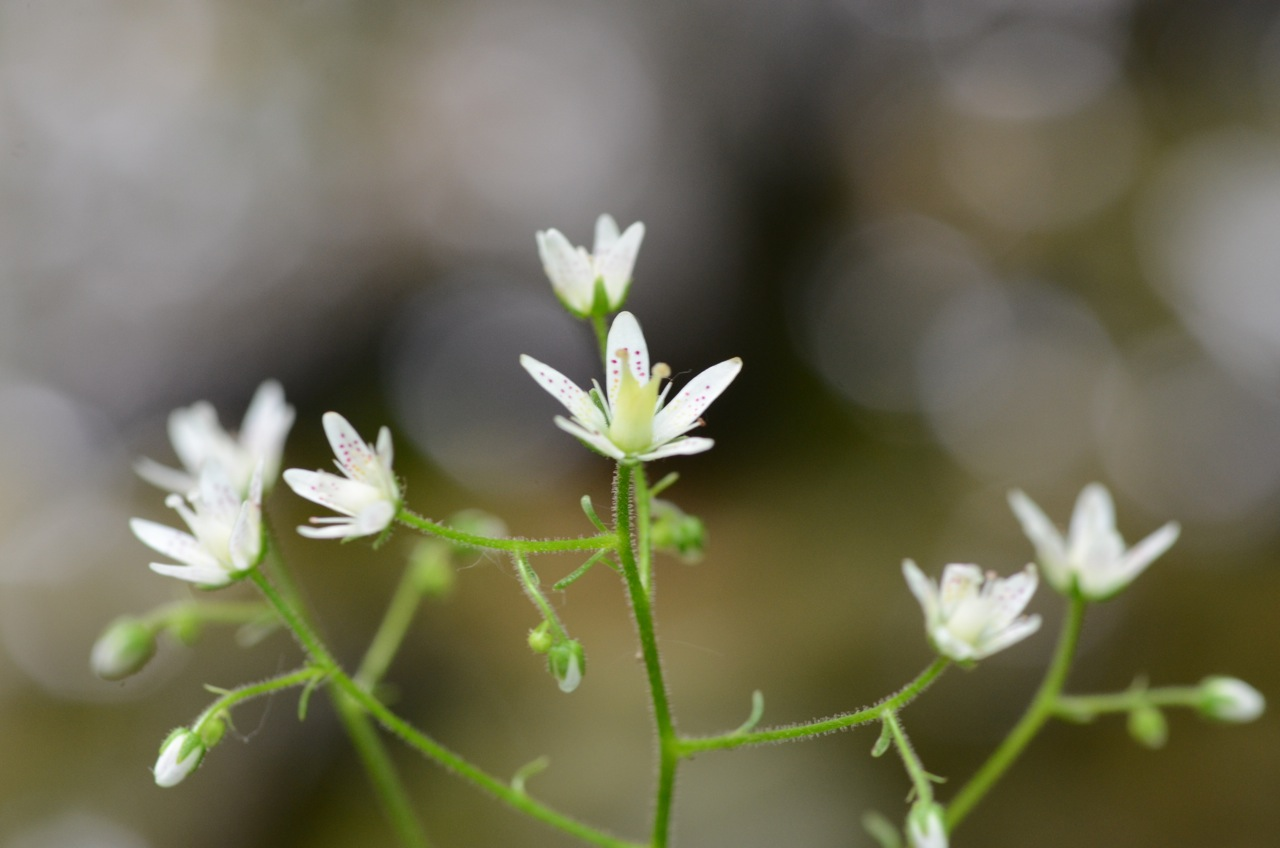 Saxifraga rotundifolia